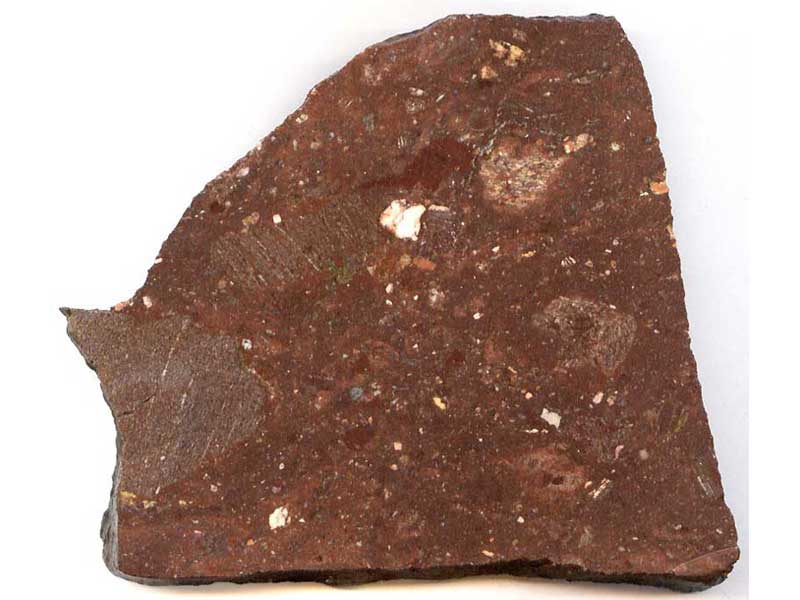 Fragment de brèche d'impactite du cratère d'impact de Rochechouart (France). Suévite de Montoume Montoume est un lieu-dit situé assez près du centre de l'impact. Ce fragment montre une matrice présentant un faible taux de fusion, voir pas de fusion du tout. Elle est constituée de retombées vitreuses qui se sont solidifiées avant d'atteindre le sol, dans lesquelles se sont mélangés des morceaux du socle. La forte teneur en fer lui donne cette coloration rouge.